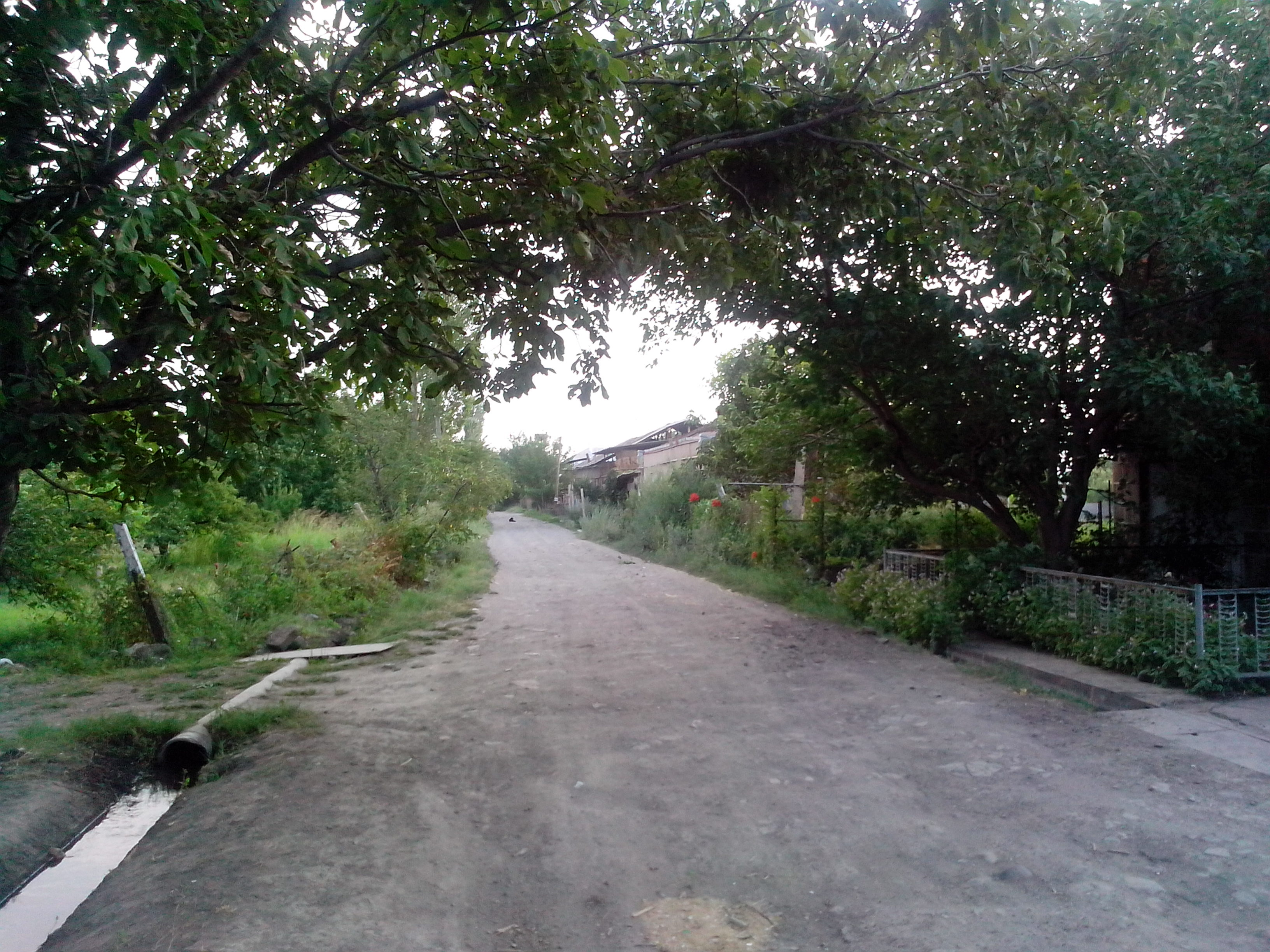 Դողսի փողոցներից մեկը ՝ Շիրազի փողոց